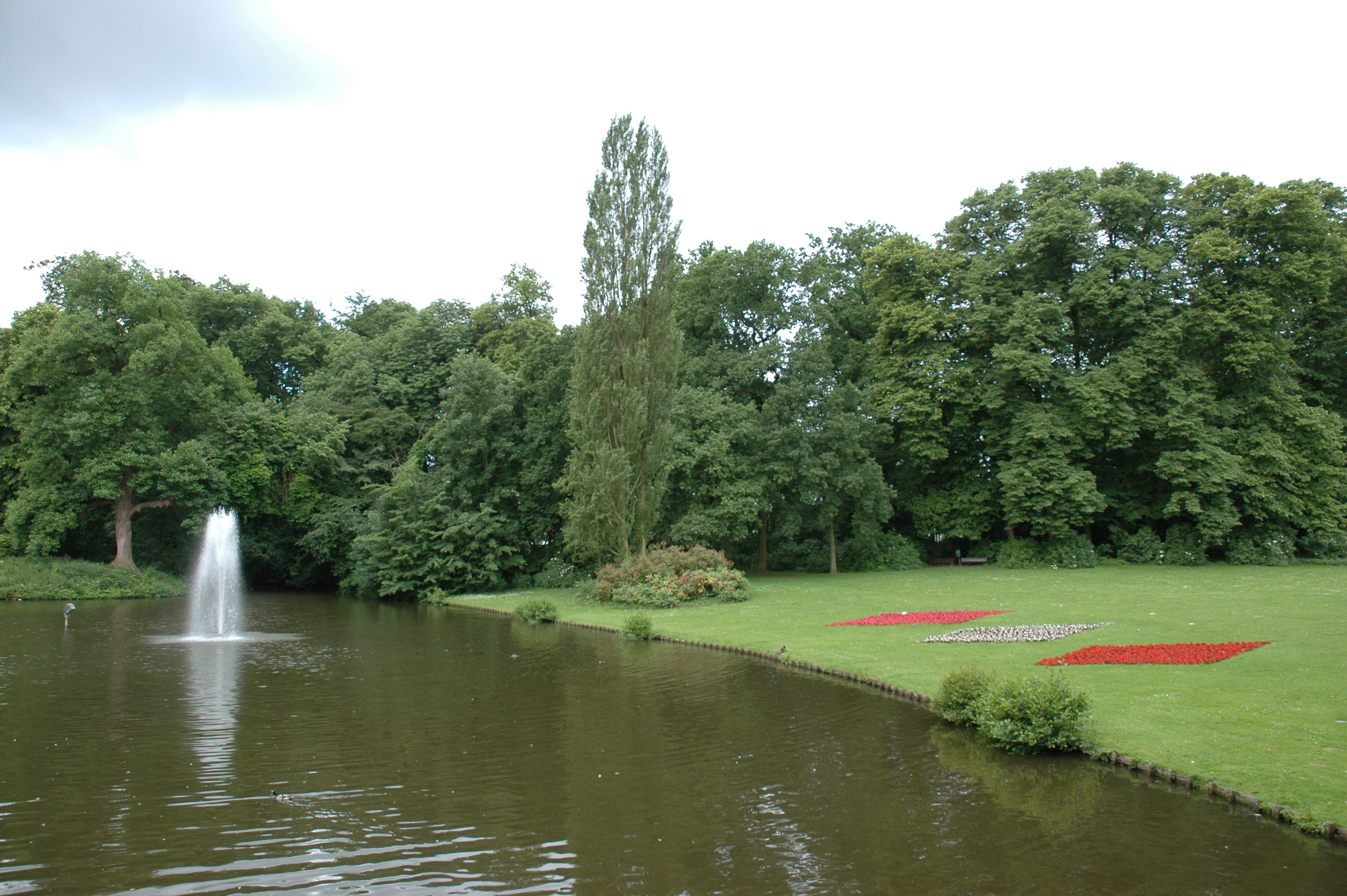 Park des Schlosses Cortewalle in Beveren